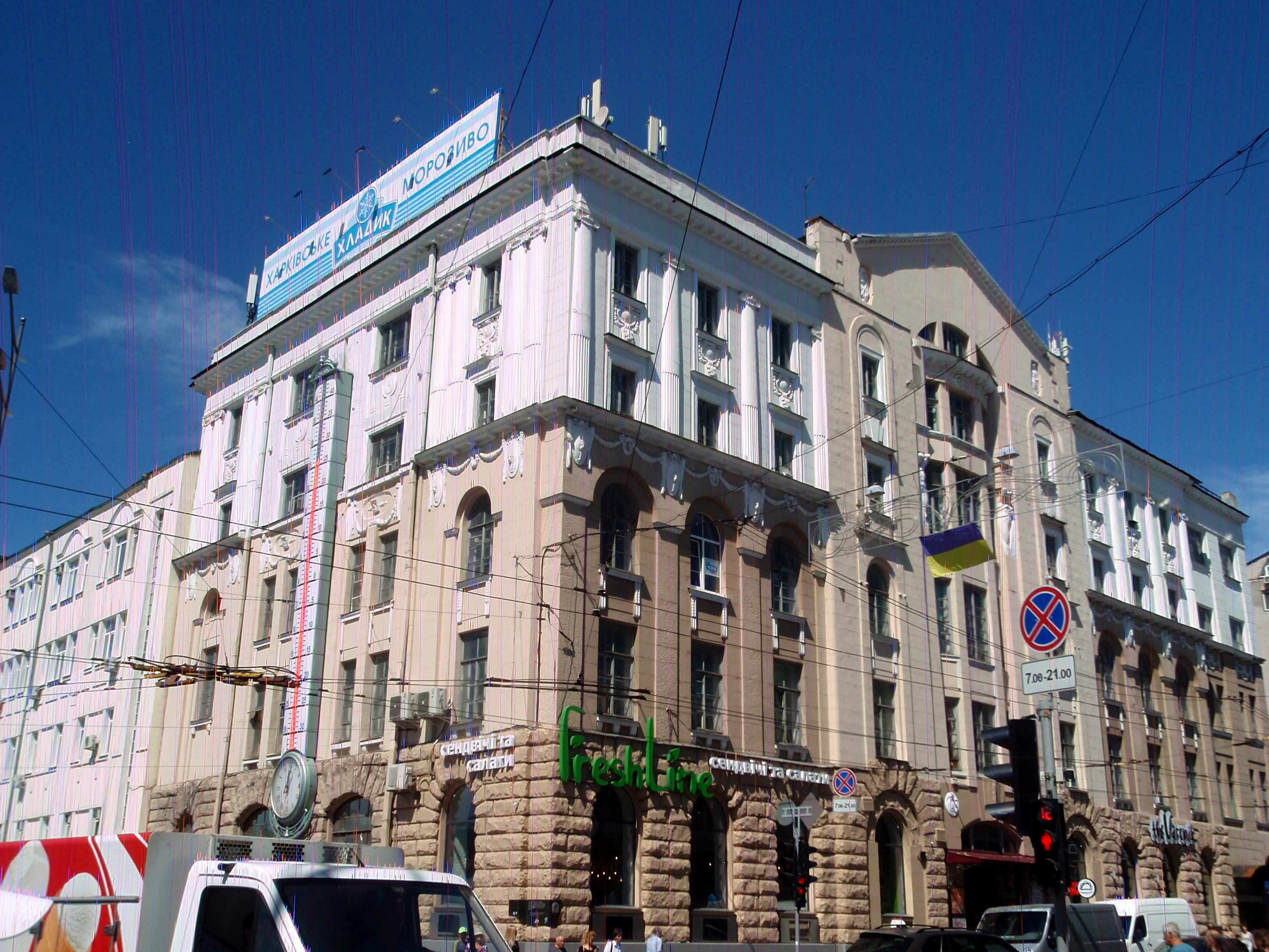 Банк «Північний». Будинок, у якому працювали В.П. Воробйов, М.Ф. Мельников-Разведенков, Г.Ф. Фольборт, Харків, вул. Сумська, 1